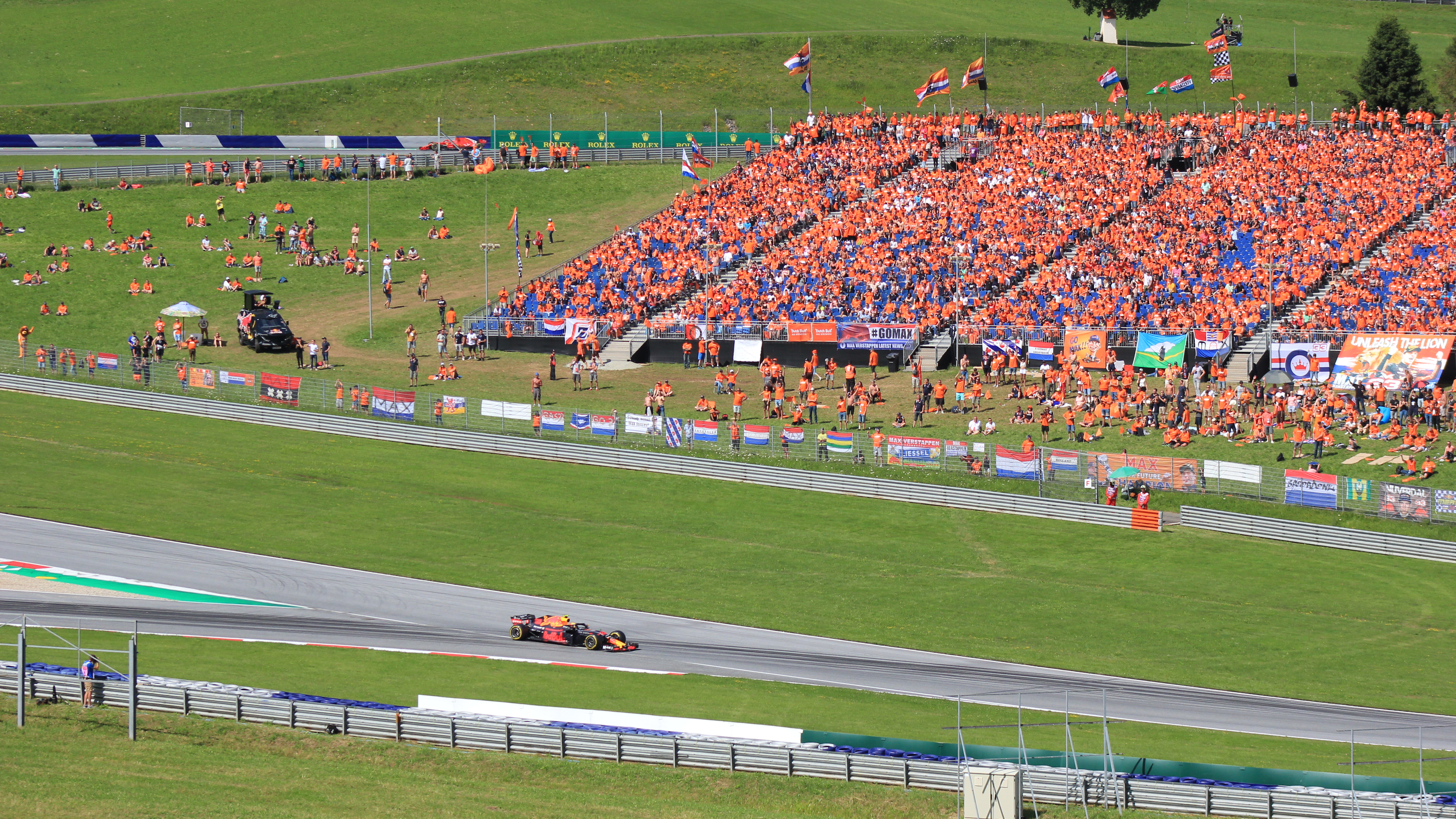 Szenen vom Rennen (Verstappen in seiner ersten Führungsrunde vor der Tribüne seiner Fans)